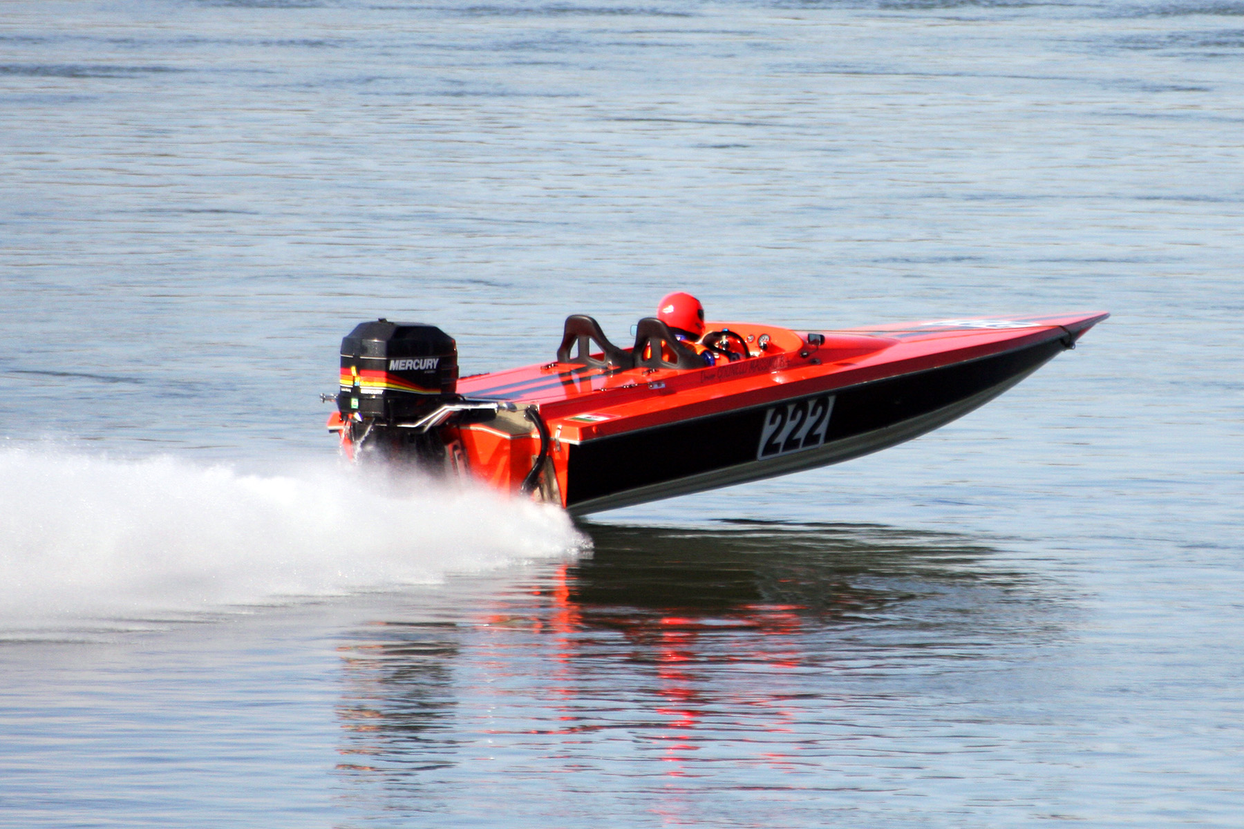 66º Raid Pavia-Venezia, N.222. Fotografato a Suzzara.